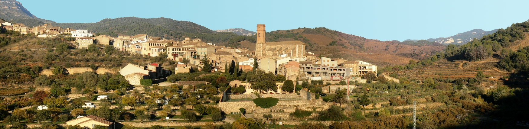 Vista de la Vila de Poboleda